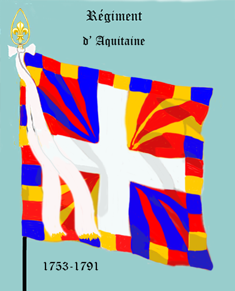 Ordonnanzfahne eines königlich französischen Infanterie-Regiments. - Entnommen und überarbeitet aus: „LES UNIFORMES ET LES DRAPEAUX DE L'ARMÉE DU ROI“ Marseille 1899. (Drapeau d'Ordonnance d' un régiment française d'infanterie royale.)